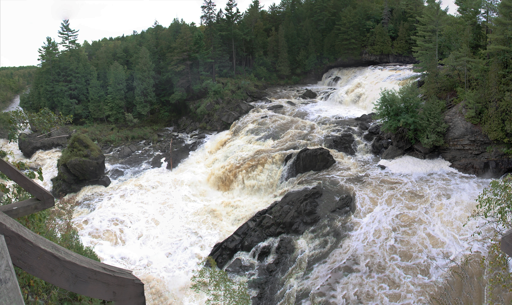 Das Bild zeigt den oberen Teil der Kaskaden der "Chutes de Plaisance", die sich nach links noch tiefer fortsetzen